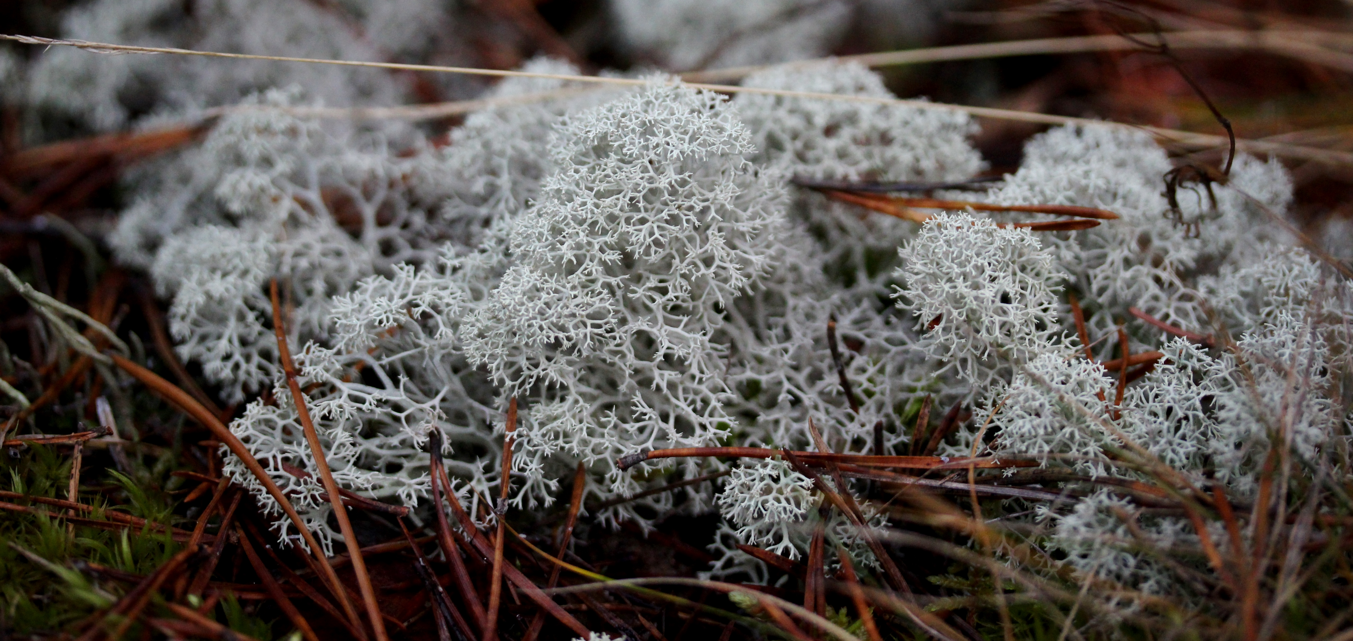 Mahe põdrasamblik. Linnumängu hoiualal, Raplamaal, Eestis.